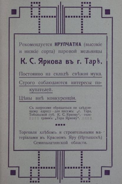 Купец Ярков К. С. торговавший в селе Евгащино